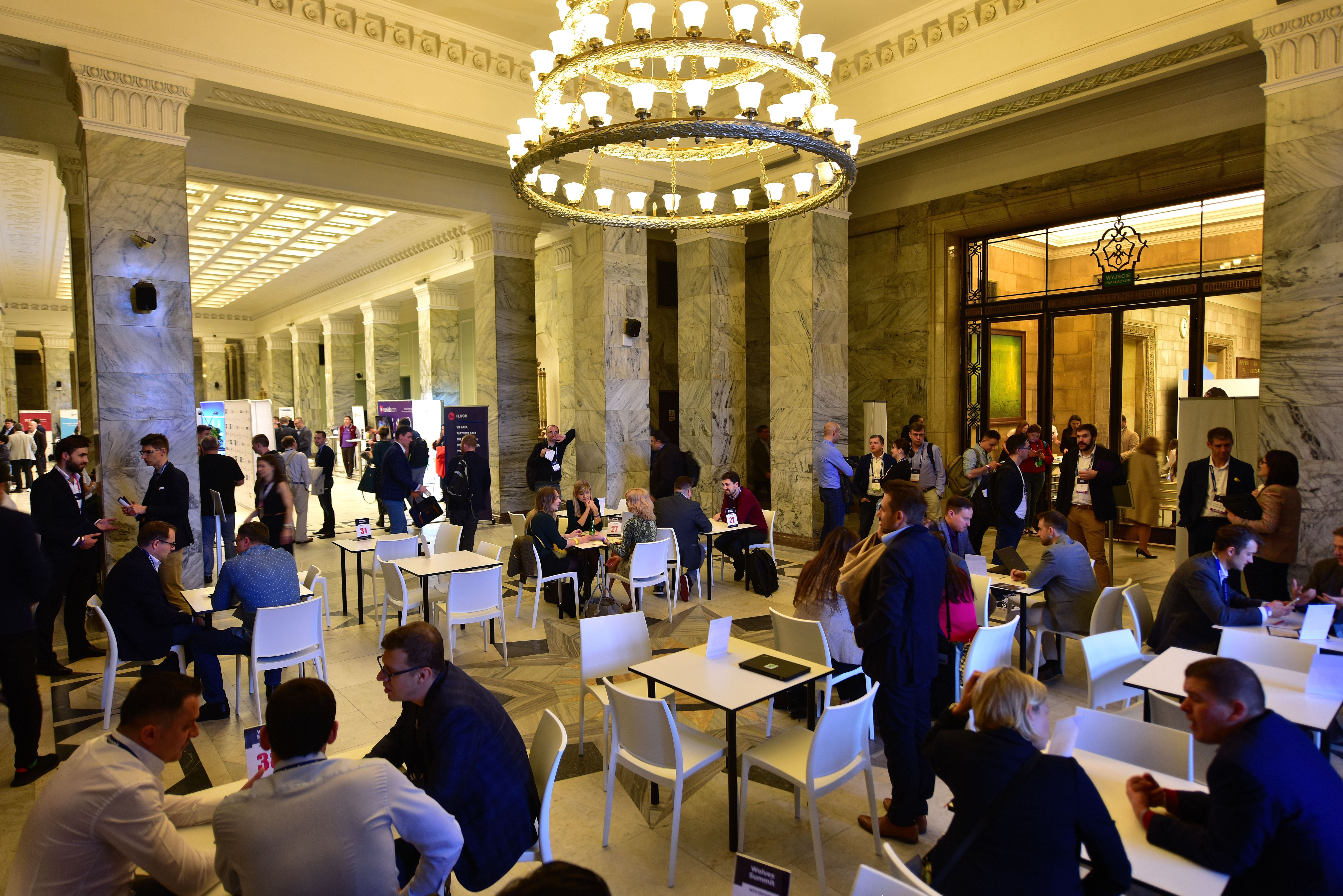 Wolves Summit 2019 w Pałacu Kultury i Nauki w Warszawie